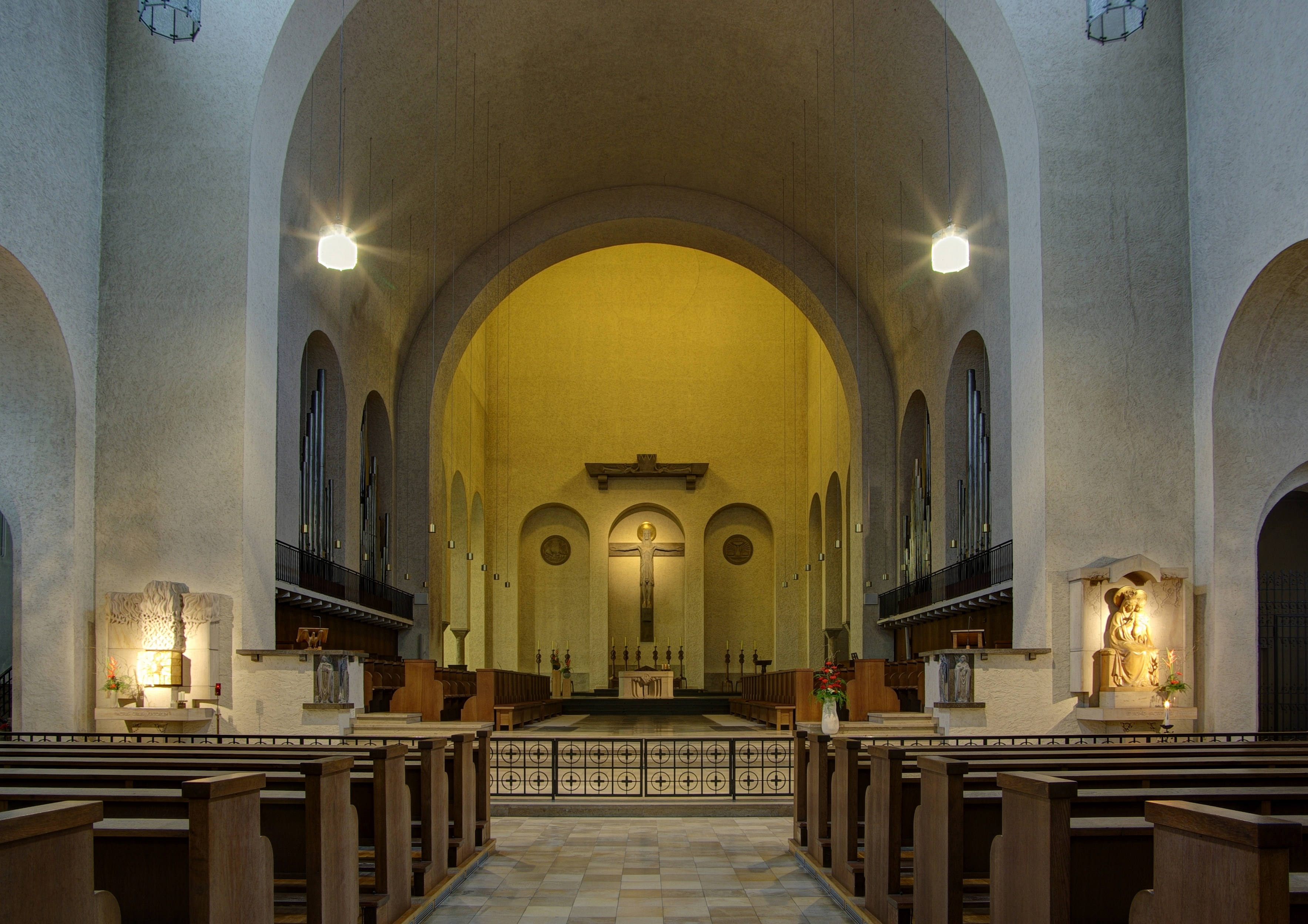 Abtei Münsterschwarzach, Innenraum